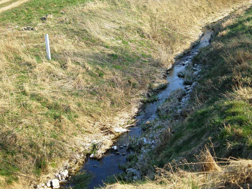 Vištupis, Kėdainių raj. Foto: Hugo.arg 2007.04.17